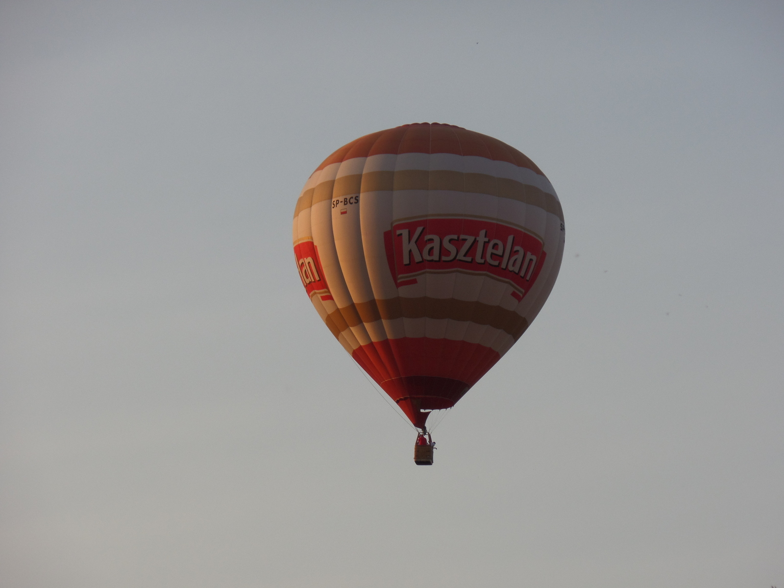 Balon, kasztelan